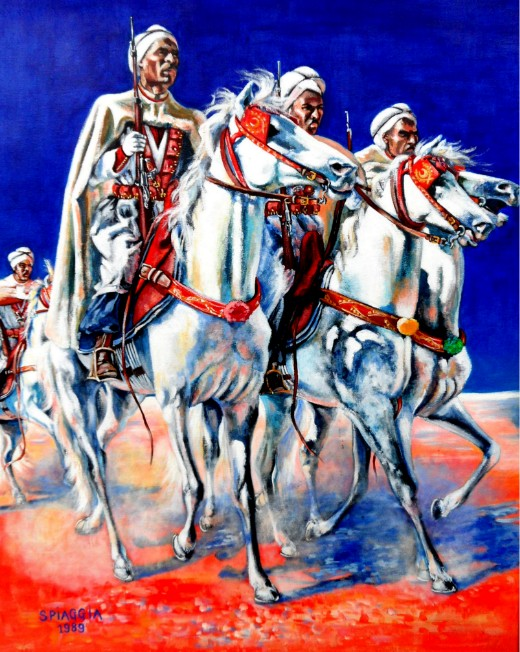 Acrylique sur Toile, 1989, dimensions 30 figure. Les Cavaliers de l’Atlas, d’après la collection de croquis et d’aquarelles Visages et Scènes d’Algérie 1957-1962, par Josette Spiaggia. Supplétifs organisés en harka et affectés à la protection des populations rurales en Algérie française. Ils étaient habillés et armés tels des engagés volontaires et répondaient aux missions dictées par le 16ème escadron nomade (4è GCNA Groupe de Compagnies Nomades d’Algérie), sur un territoire très vaste. Ces unités montées avaient une supériorité incontestable par rapport aux engins motorisés pour lesquels le terrain était peu praticable.